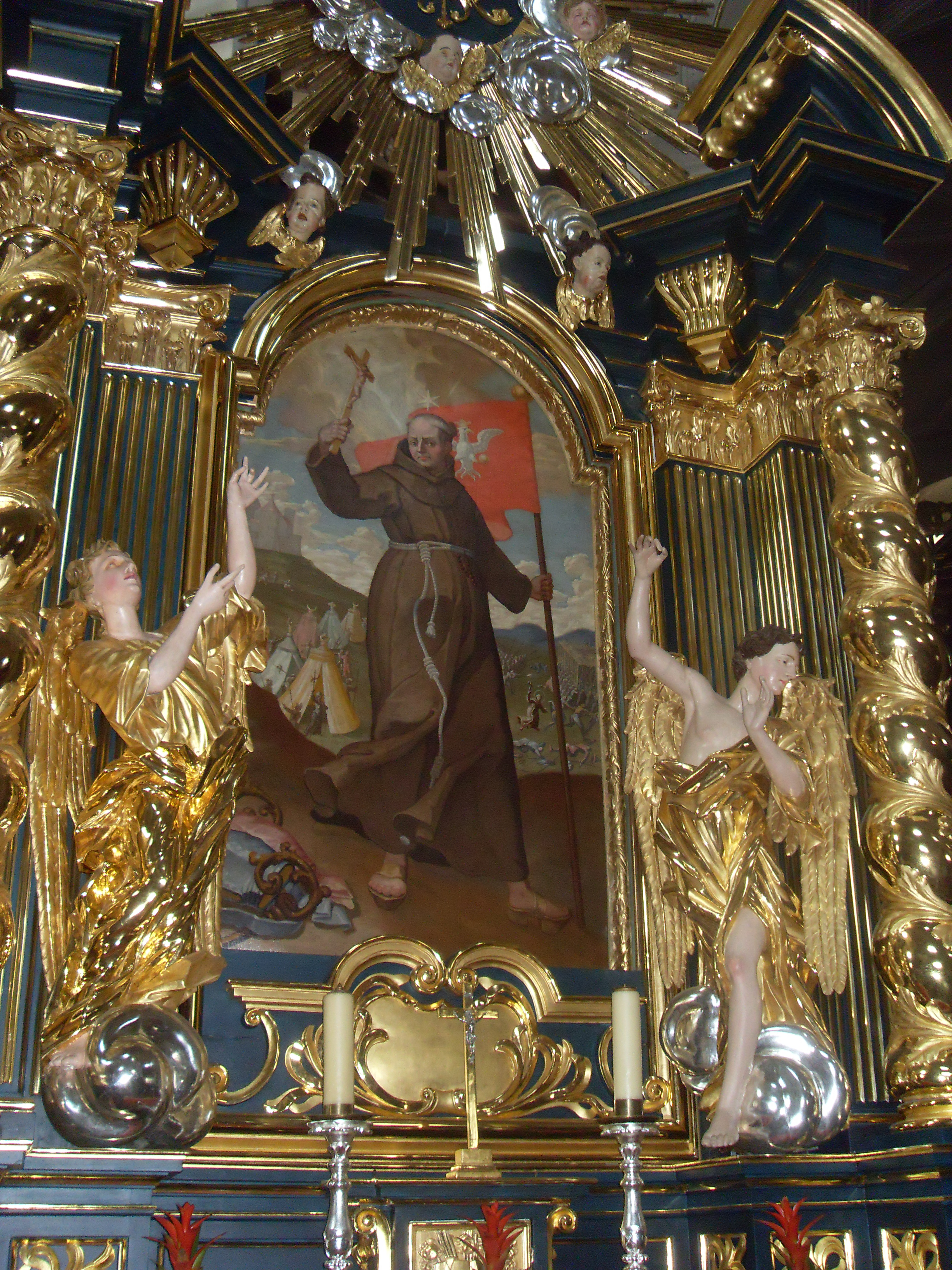 Ołtarz św. Jana Kapistrana z krakowskiego kościoła św. Bernardyna na Stradomiu.